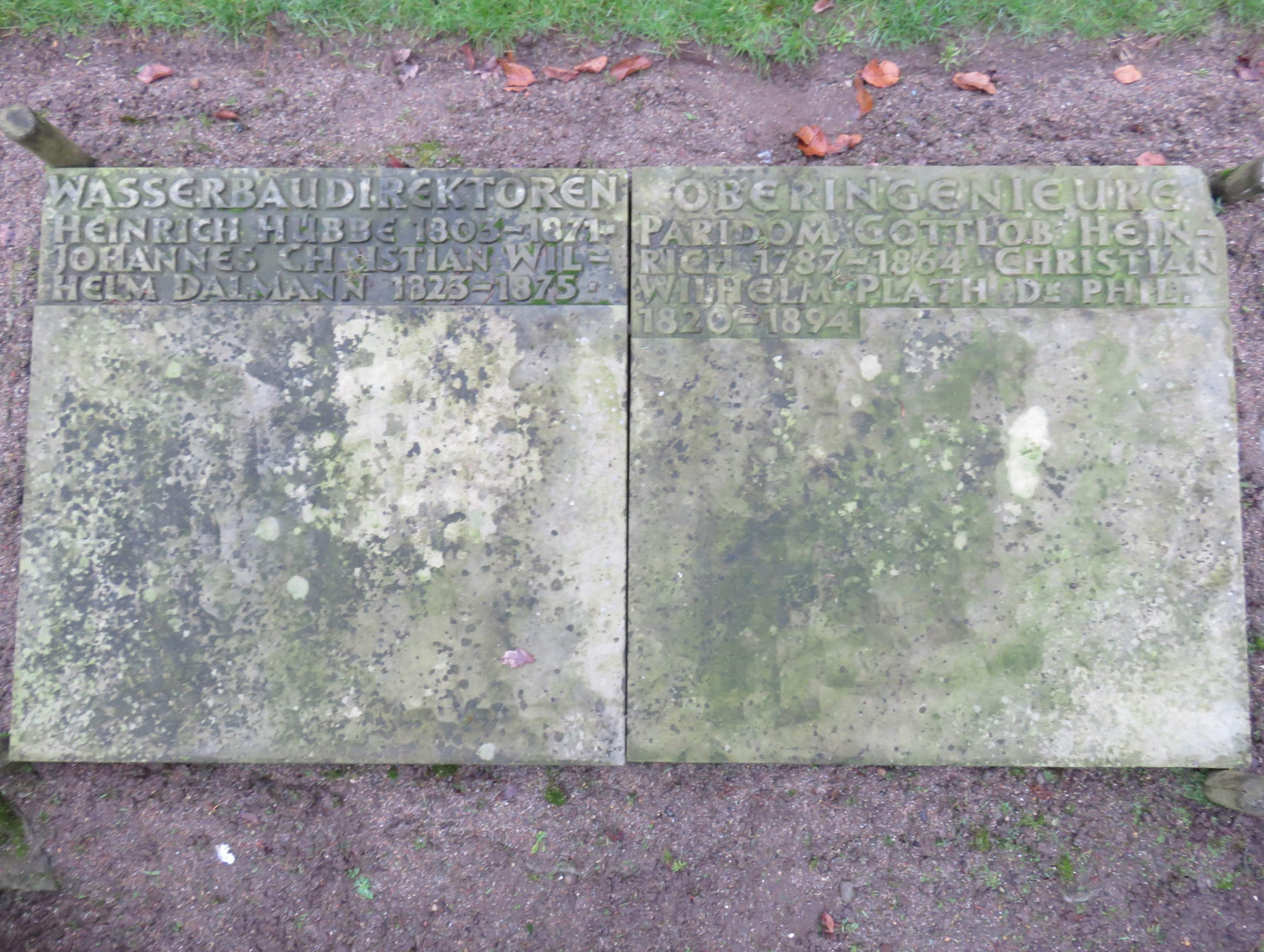 Sammelgrabmal (linke Hälfte) zu Ehren des Hamburger Wasserbaudirektors Heinrich Hübbe im Bereich des Althamburgischen Gedächtnisfriedhofs auf dem Hamburger Friedhof Ohlsdorf, Querachse südöstlicher Teil.